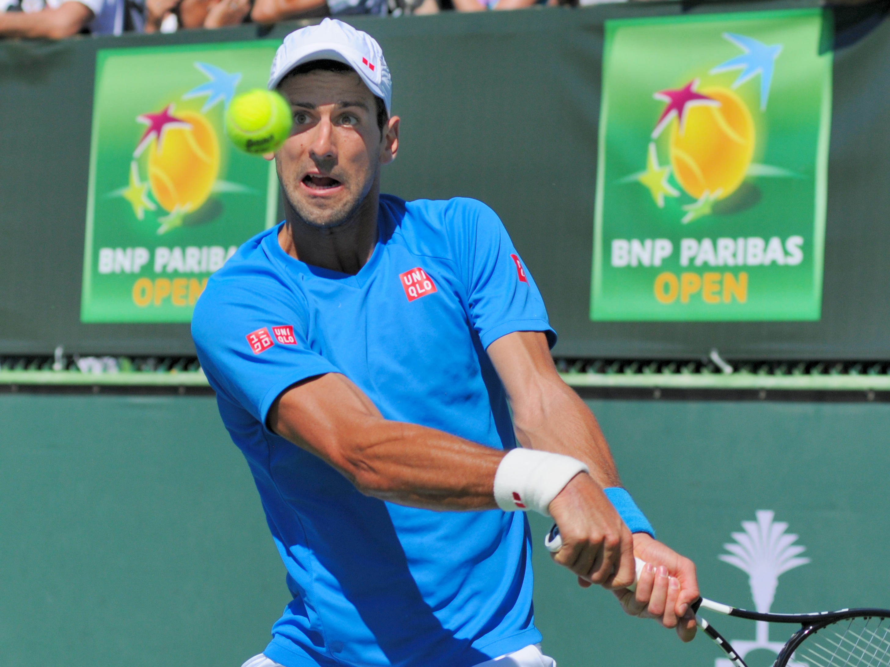 2015 BNP Paribas Open